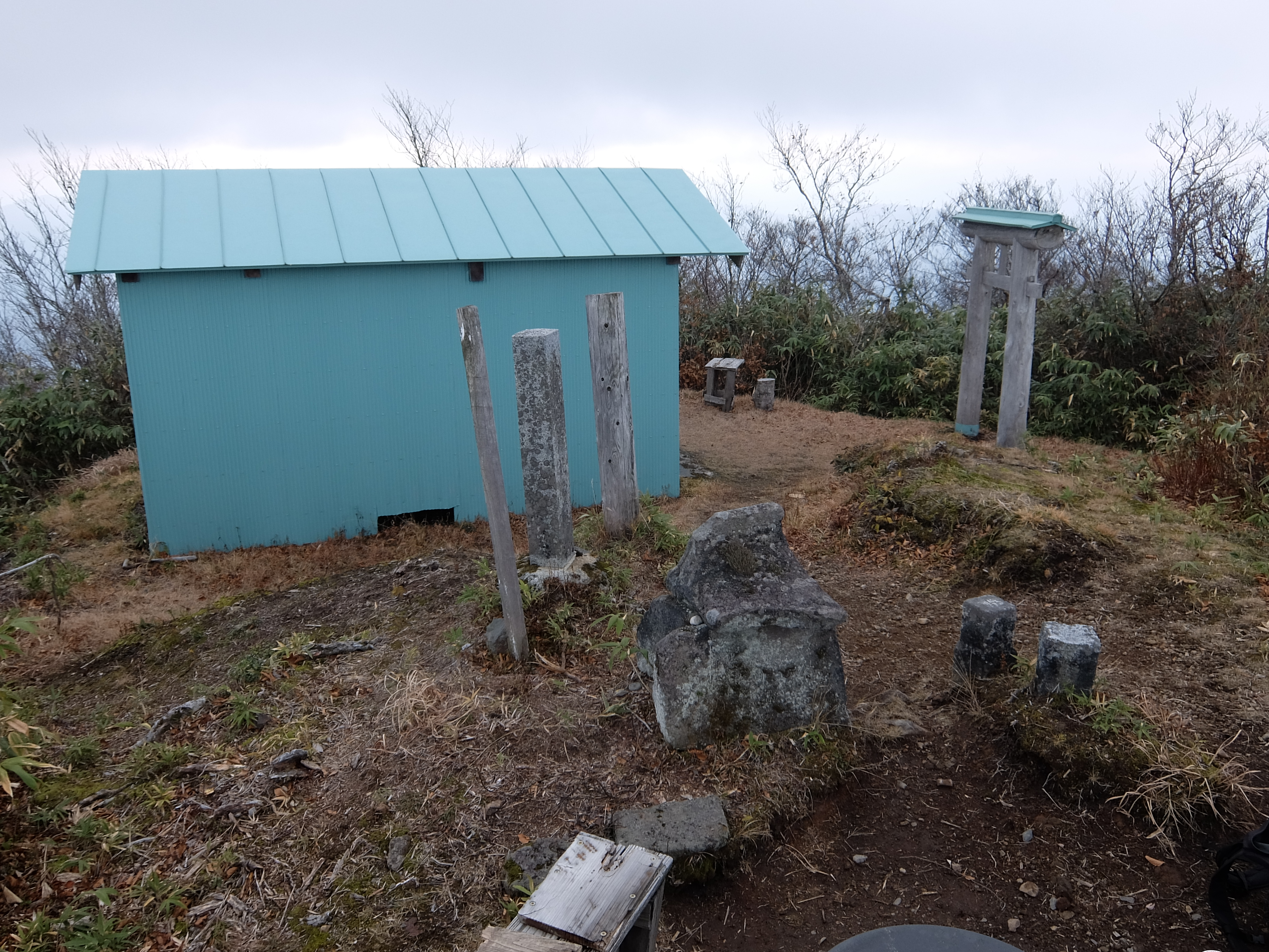 鹿角市の五の宮岳山頂